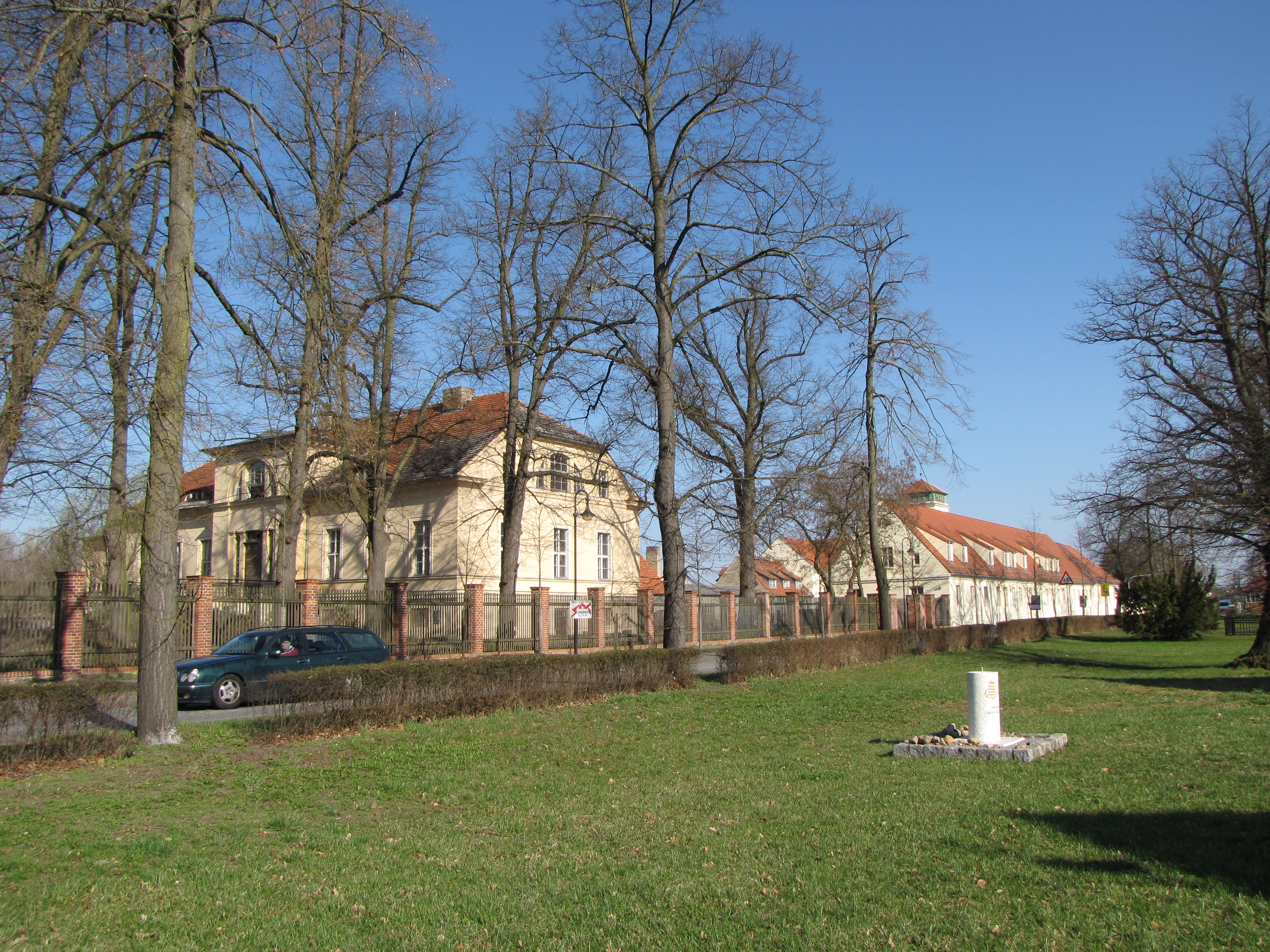 Gutsanlage Groß Machnow, Gem. Rangsdorf, Brandenburg, Gutshaus mit Wirtschaftsgebäude. In den längs zur Straße stehenden Gebäuden ist die Grundschule untergebracht. Him Hintergrund der Uhrenturm